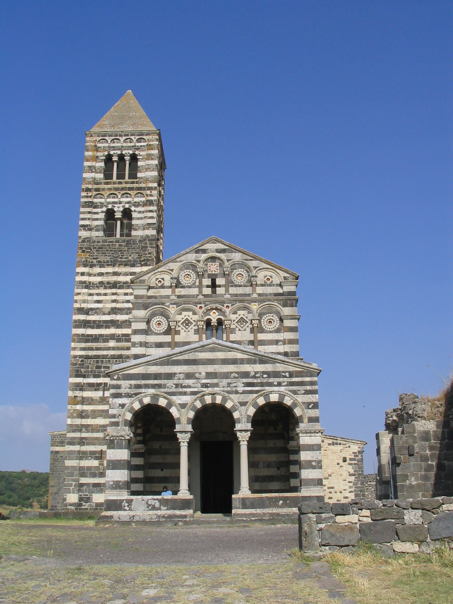 Església romànica de la Santissima trintà di Saccargia. Sardenya